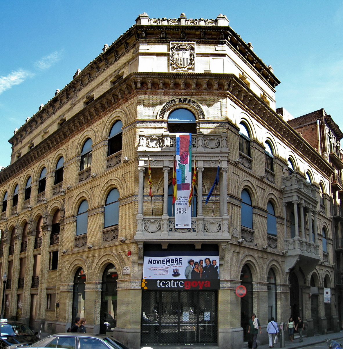 Teatre Goya. Ubicat dins de l'edifici del Centre Aragonès, un edifici d'estil renaixentista aragonès de 1917, obra de Miguel Ángel Navarro Pérez. Va rebre una menció al concurs d'edificis artístics de 1917 de l'Ajuntament de Barcelona